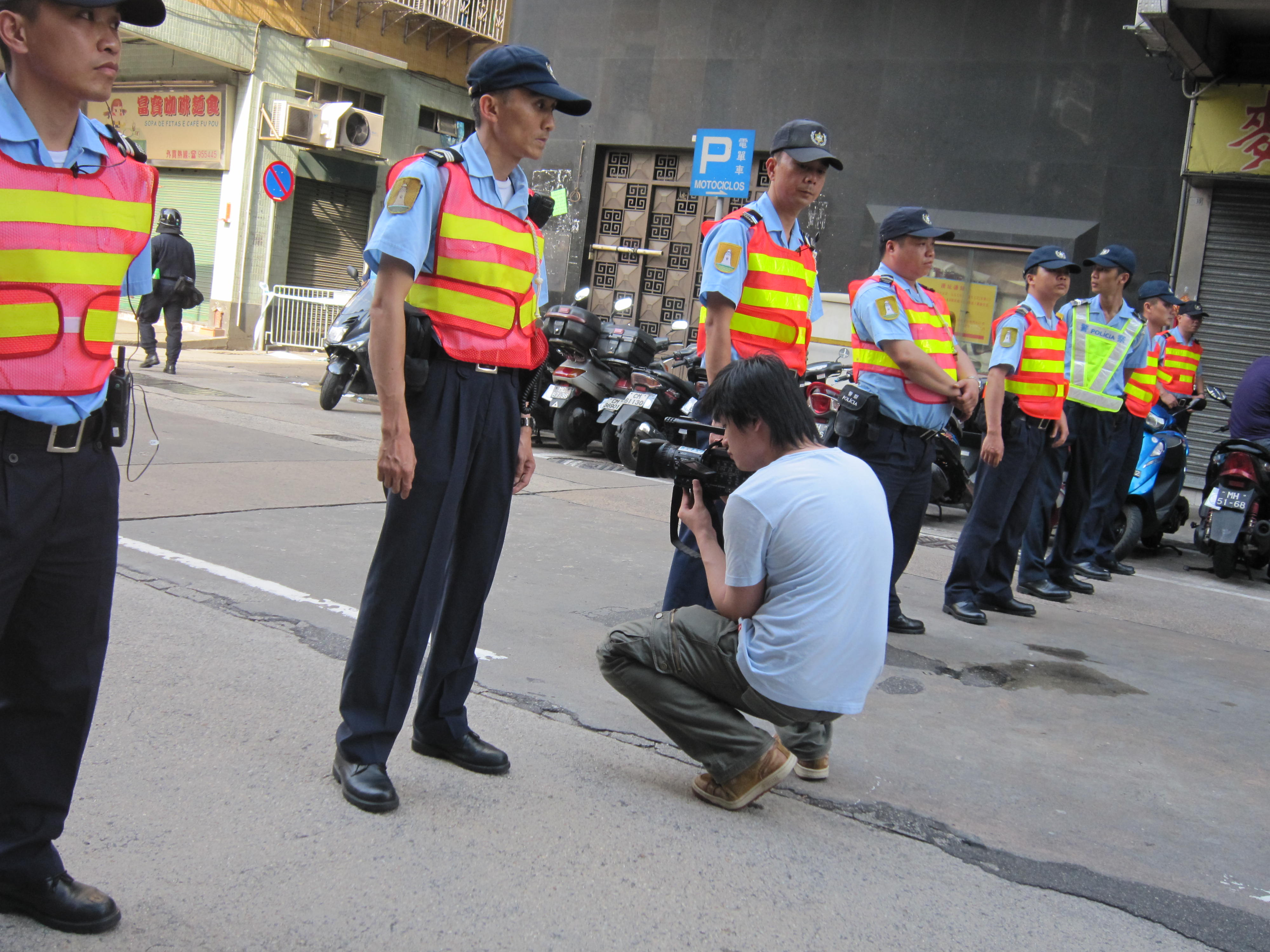 Procissão em Macau em 1 de Maio de 2010